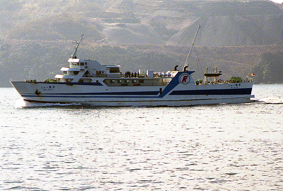 国道九四フェリー ニュー豊予